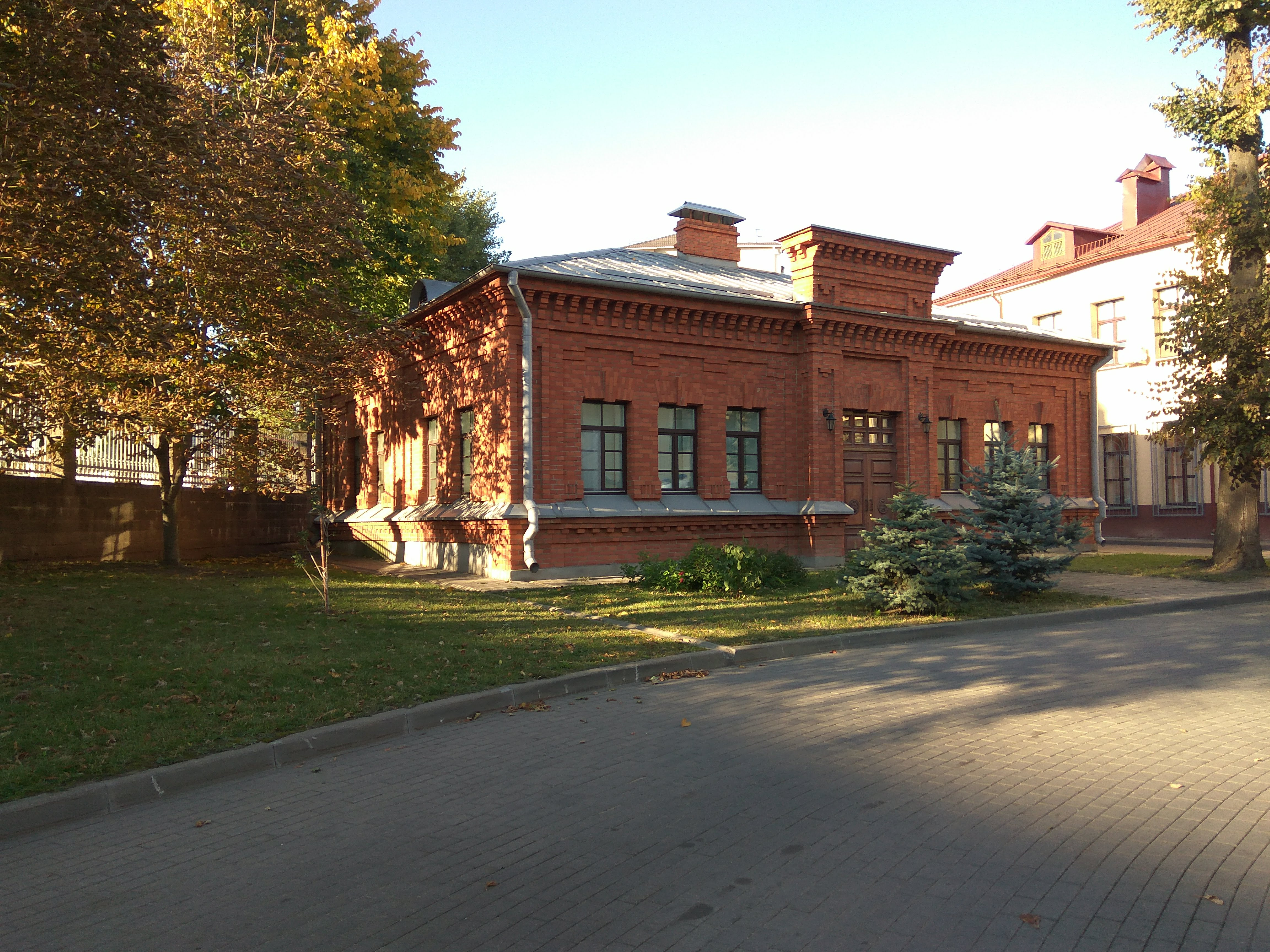 Мінск. Вуліца Леніна. 3-я гарадская бальніца імя Клумава